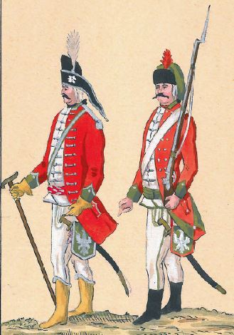 48. Chorągiew węgierska Buławy Polnej Koronnej